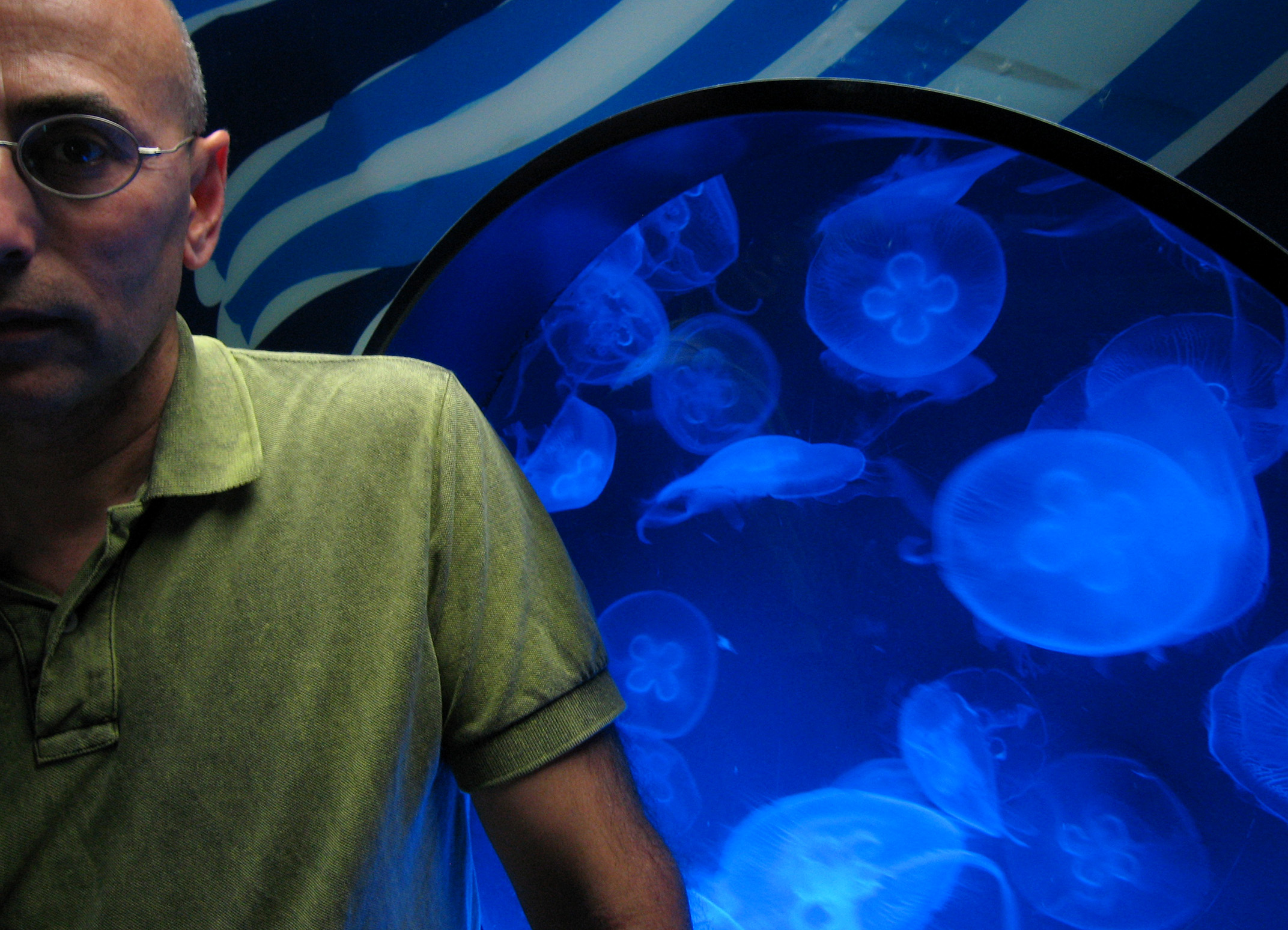 Ritratto "acquatico" di Tommaso Ottonieri, nella Sala Meduse.